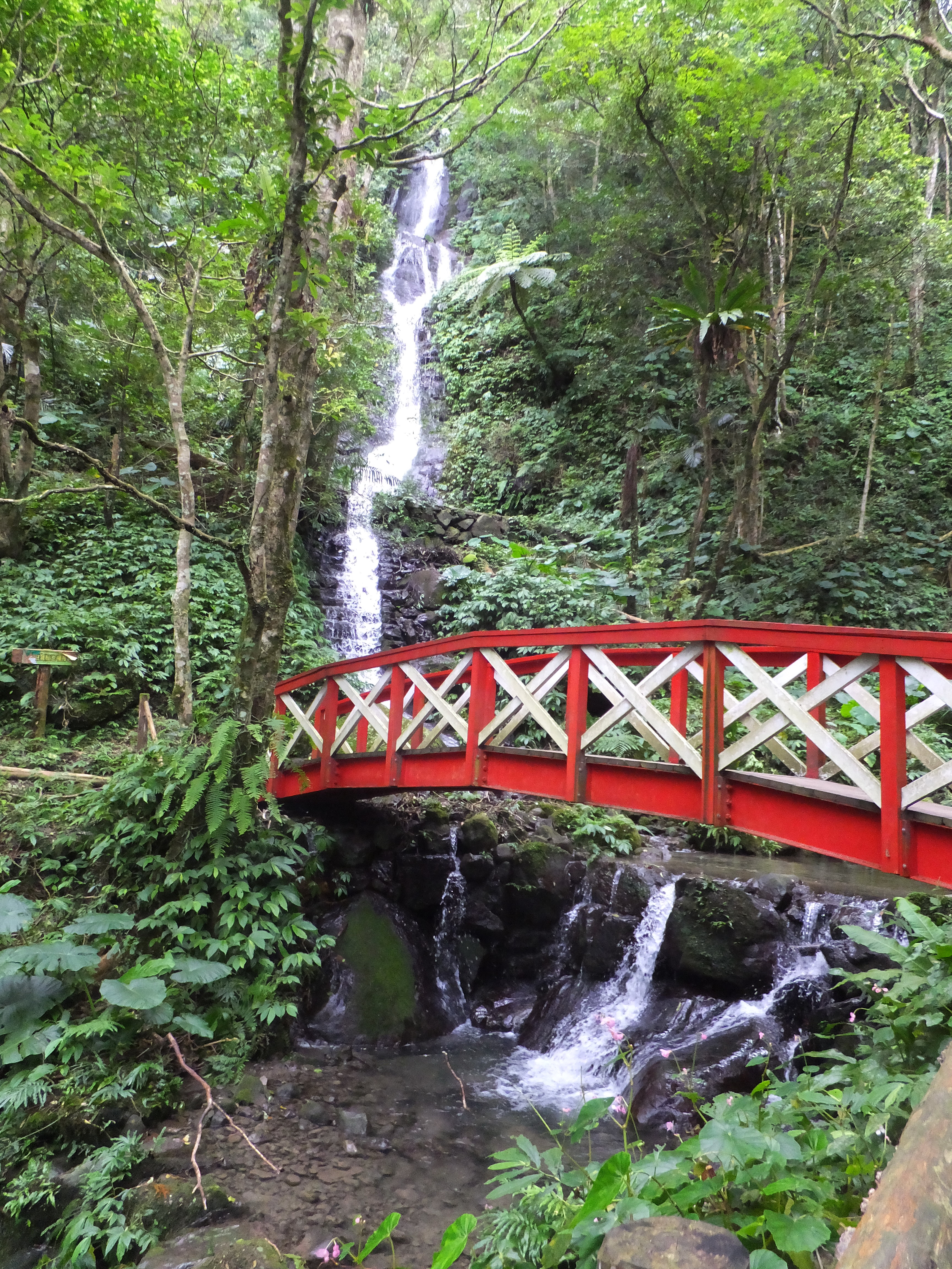 馬武督瀑布 Mawudu Waterfall